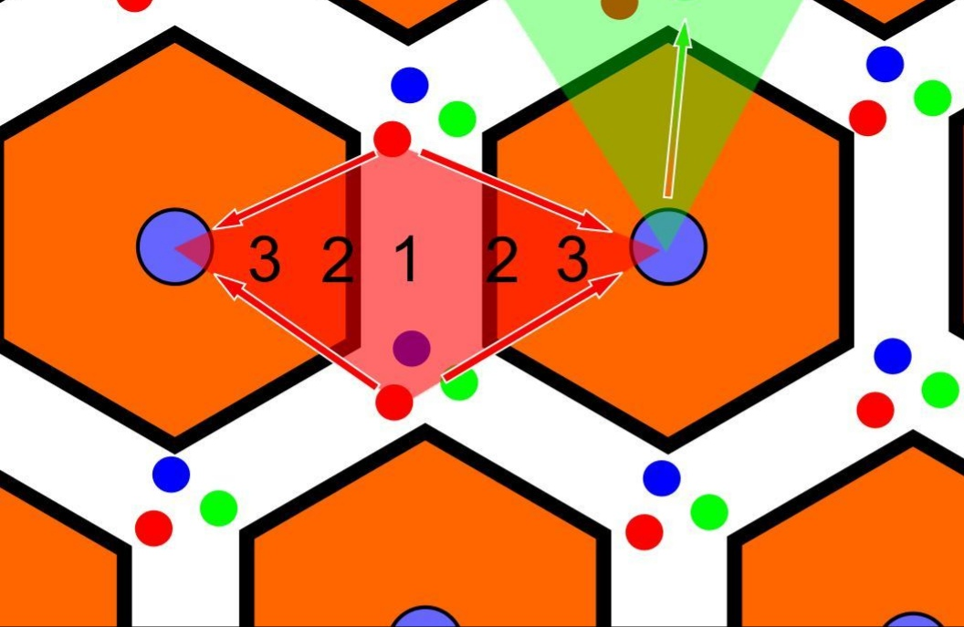 Acino hepático